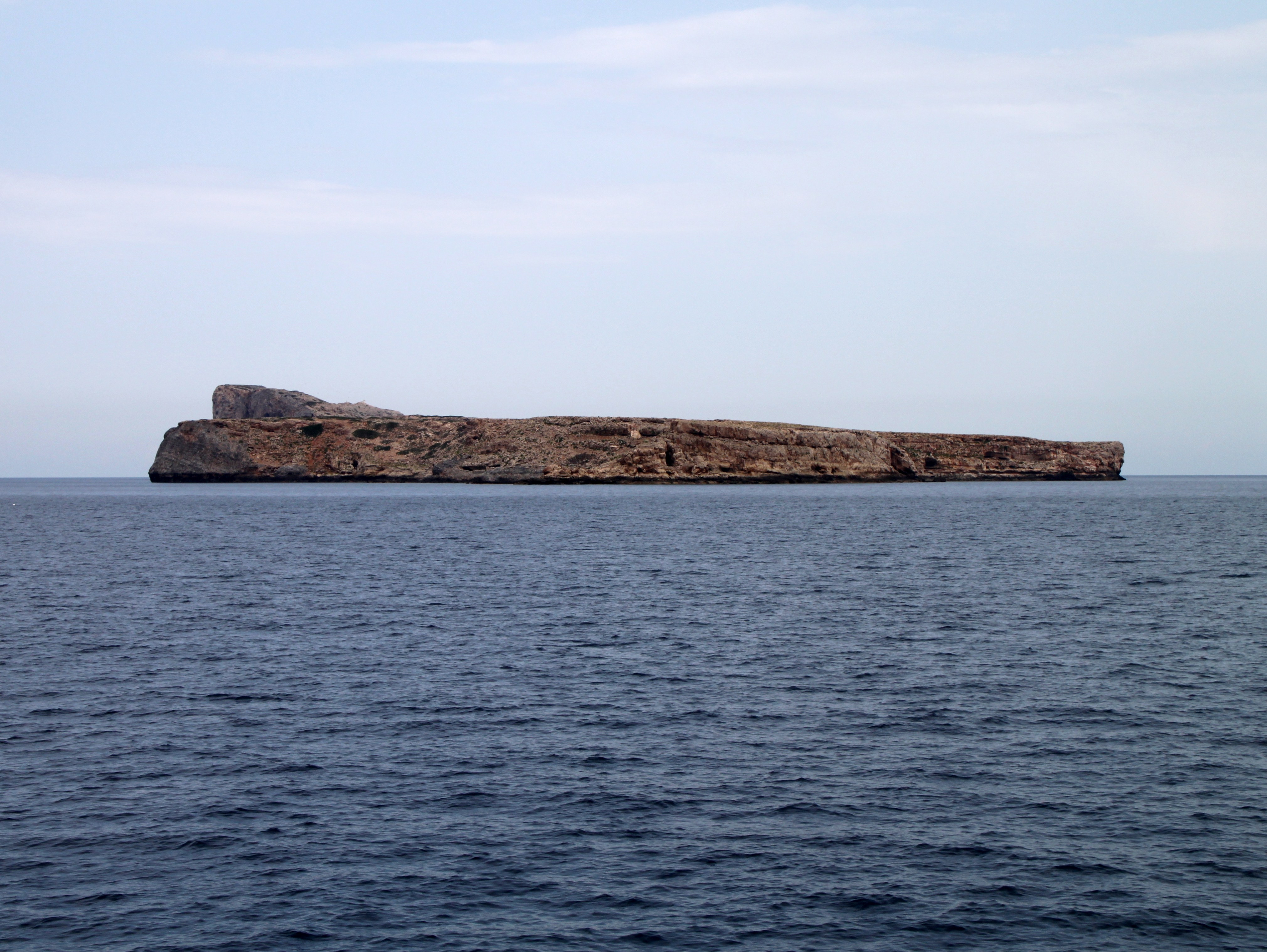 Agria Gramvousa (Άγρια Γραμβούσα), Insel in der Gemeinde Kissamos, Regionalbezirk Chania, Kreta, Griechenland